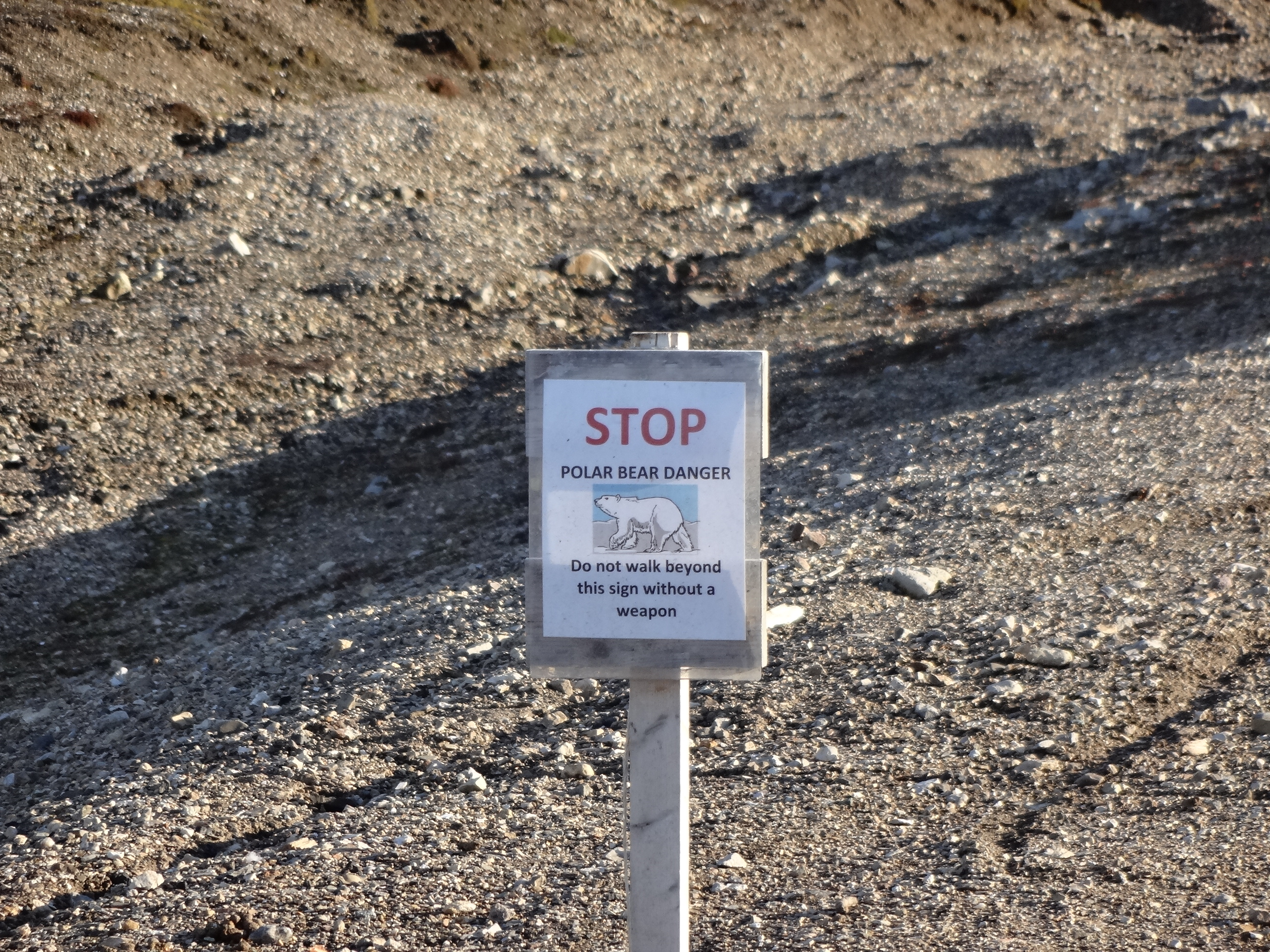 Il cartello avvisa la popolazione che oltre questo limite è necessario muoversi muniti di arma idonea